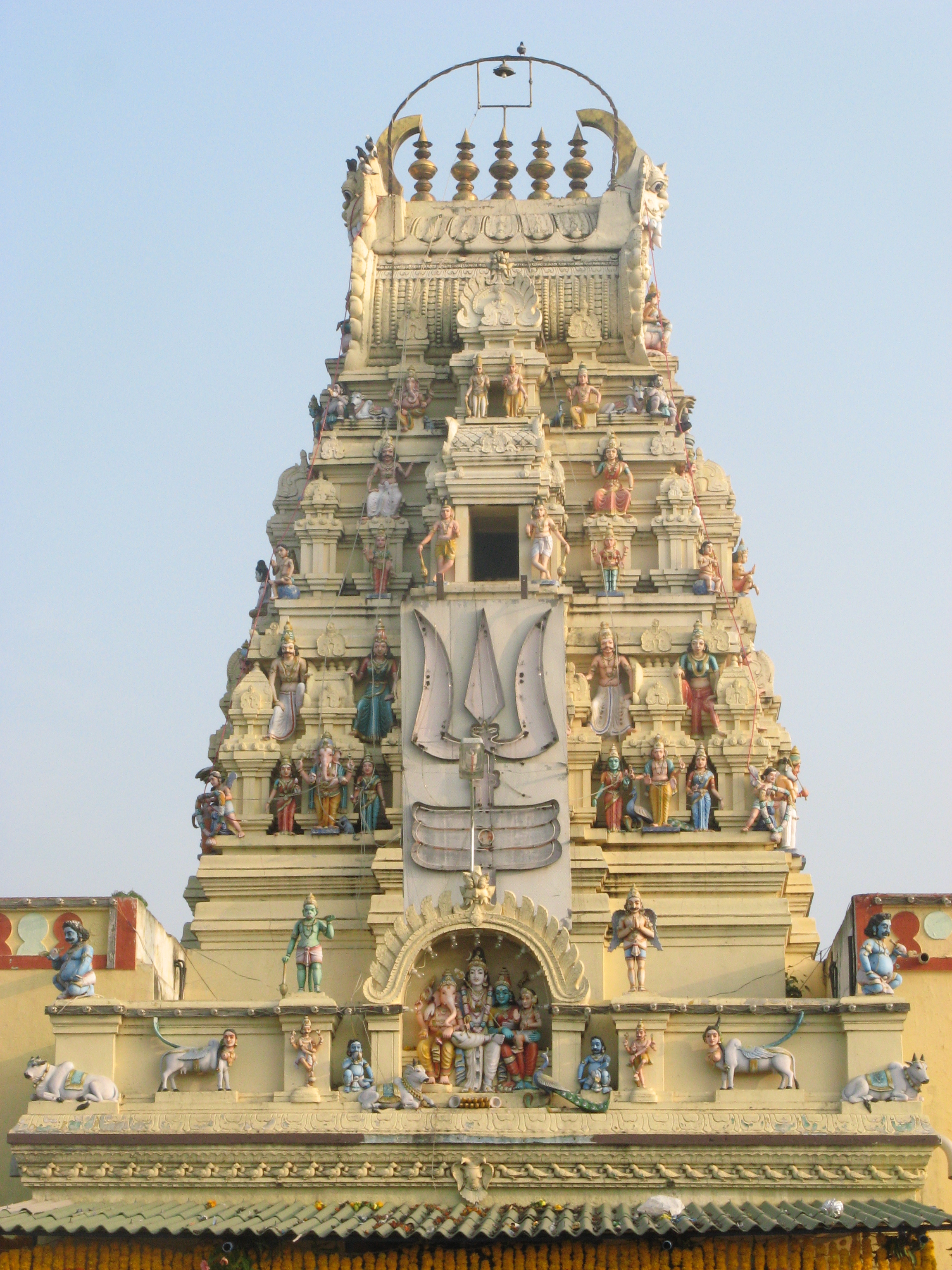 ಕನ್ನಡ: ಶ್ರೀ ಮಲೆ ಮಹದೇಶ್ವರ - ದಕ್ಷಿಣ ದ್ವಾರ